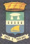 Blason de Locmariaquer (Morbihan)